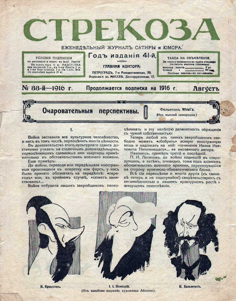 Титульный лист журнала «Стрекоза»